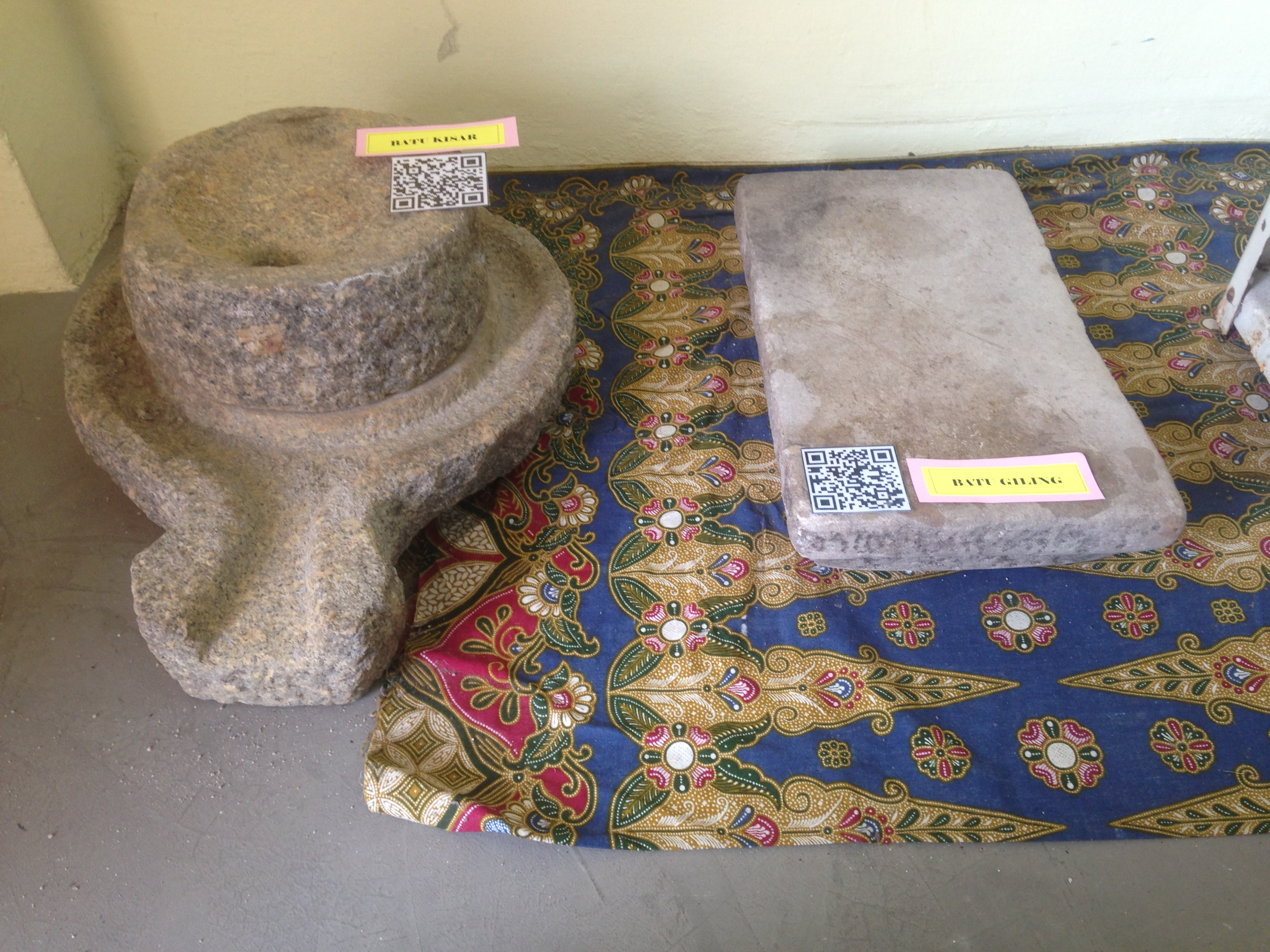 BATU KISAR